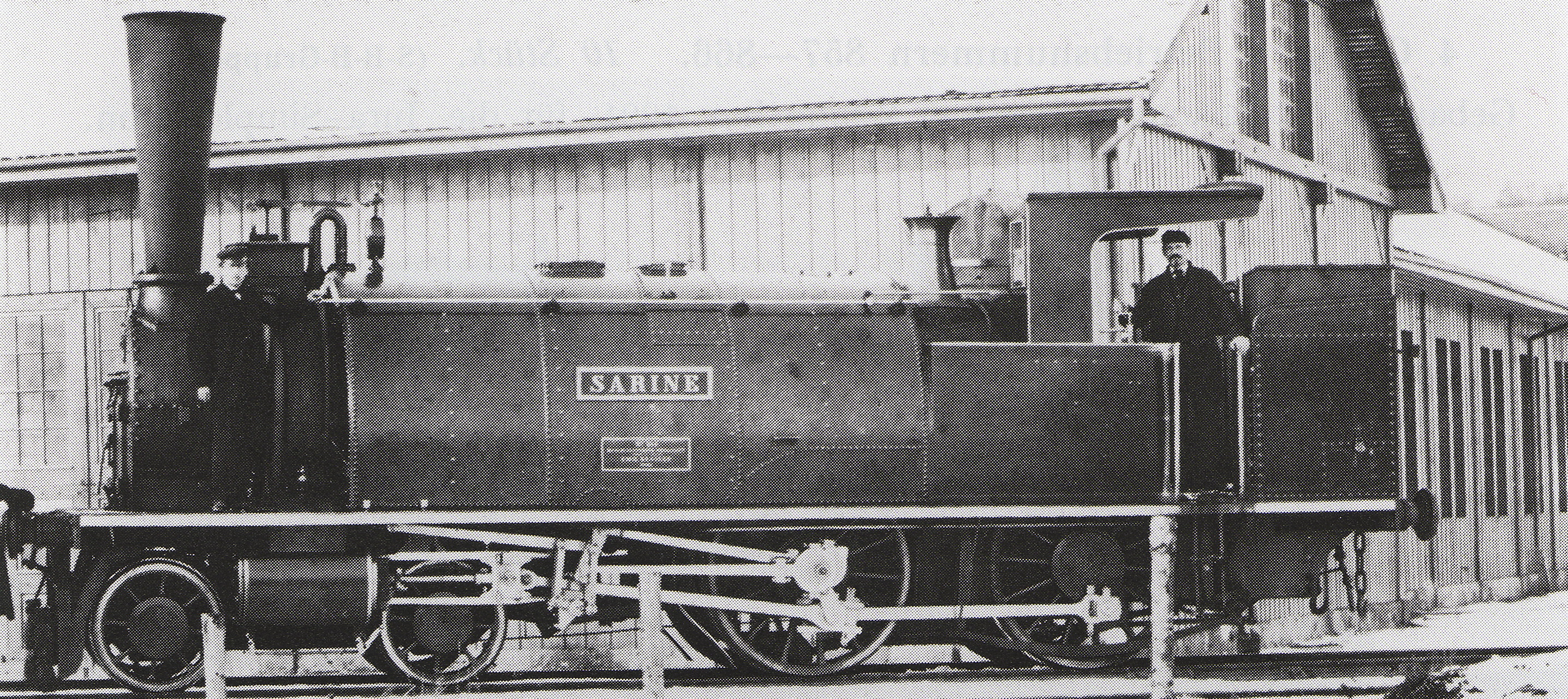 Tender-Locomotive B2 Nr. 260 Sarine der Jura—Simplon-Bahn mit ſattelförmig über den Dampfkeſſel glegtem Waſſerbehälter, gebaut 1862 inn Emil Keſslers Machines-Fabrique zů Eſslingen (Fabr-Nr. 584) für die Lauſanne—Freiburg—Bern-Bahn (Betribsnr. 10), 1865 von den Chemins de fer de la Suisſe Occidentale übernommen (ab 1871 Betribsnr. 60), 1881 an die Suisſe-Occidentale-Simplon, 1890 an die Jura—Simplon-Bahn, 1901 außer Dienſt geſtellt und anſchließend abgebrochen.